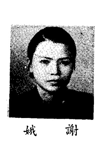 中文（中国大陆）: 制憲國民大會代表